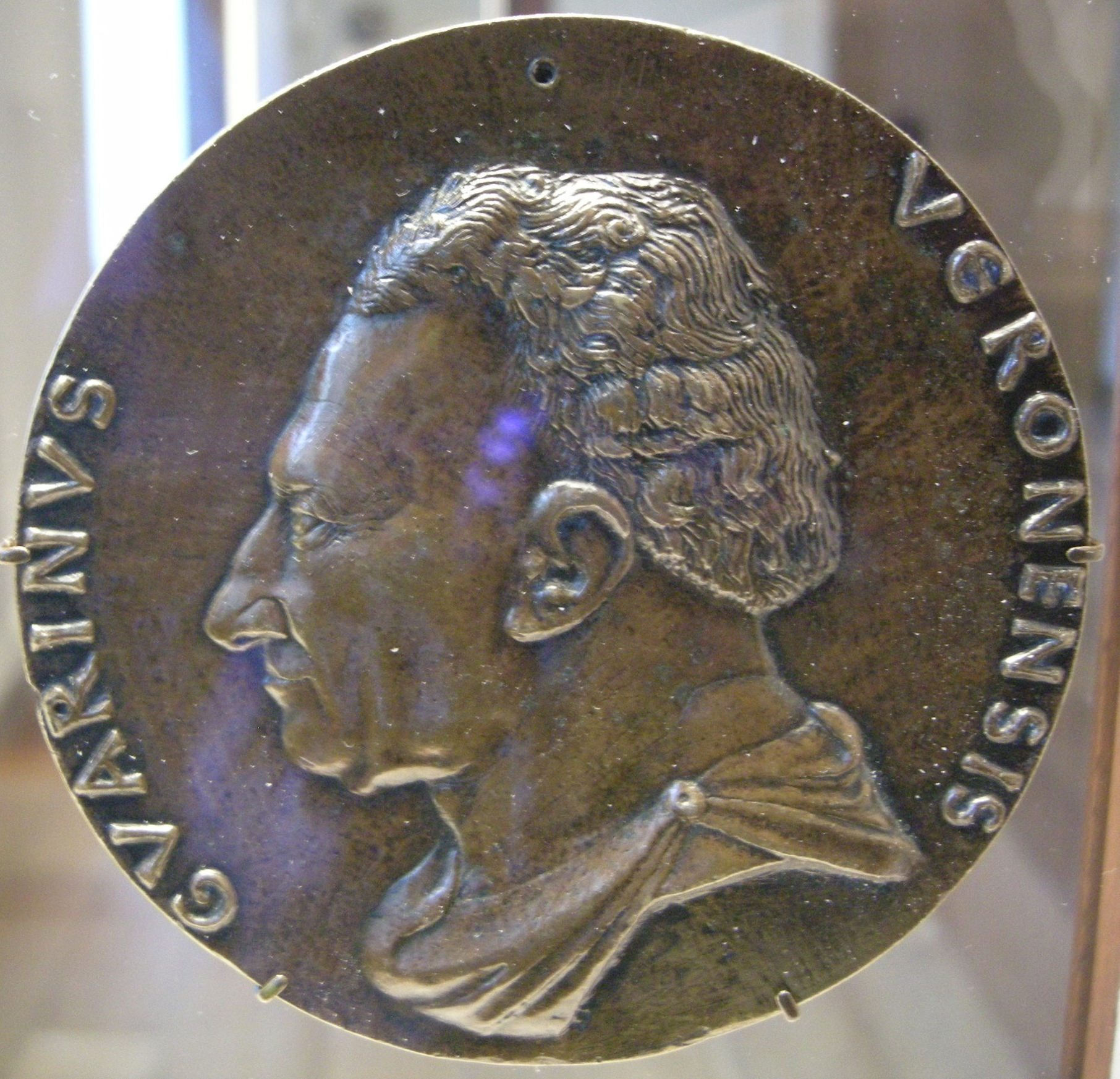 Muardino da Verona, recto, 1446 c.